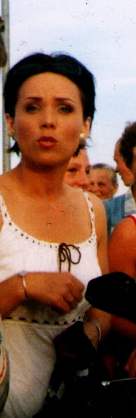 Aušra Kilkuvienė 2003 m. Palangoje. Photo made in 2003 with non-digital camara and than scanned with EPSON and cropped.